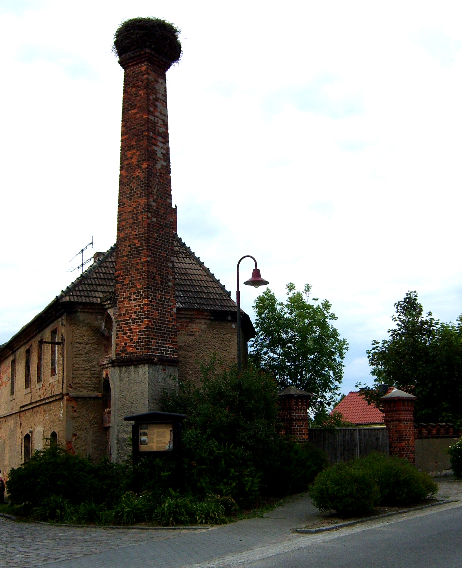 Maasdorf